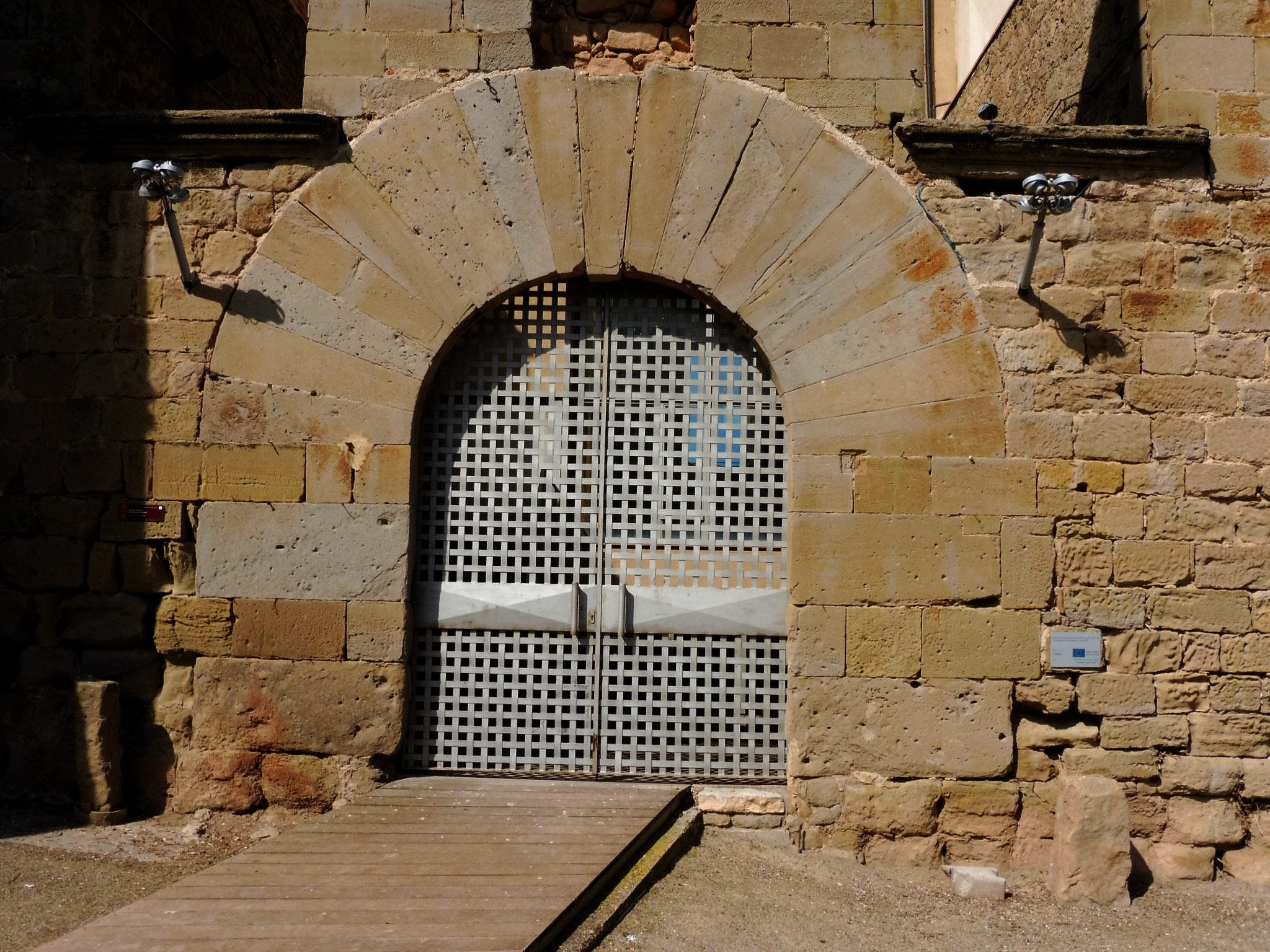 Castell de Concabella (els Plans de Sió): portal